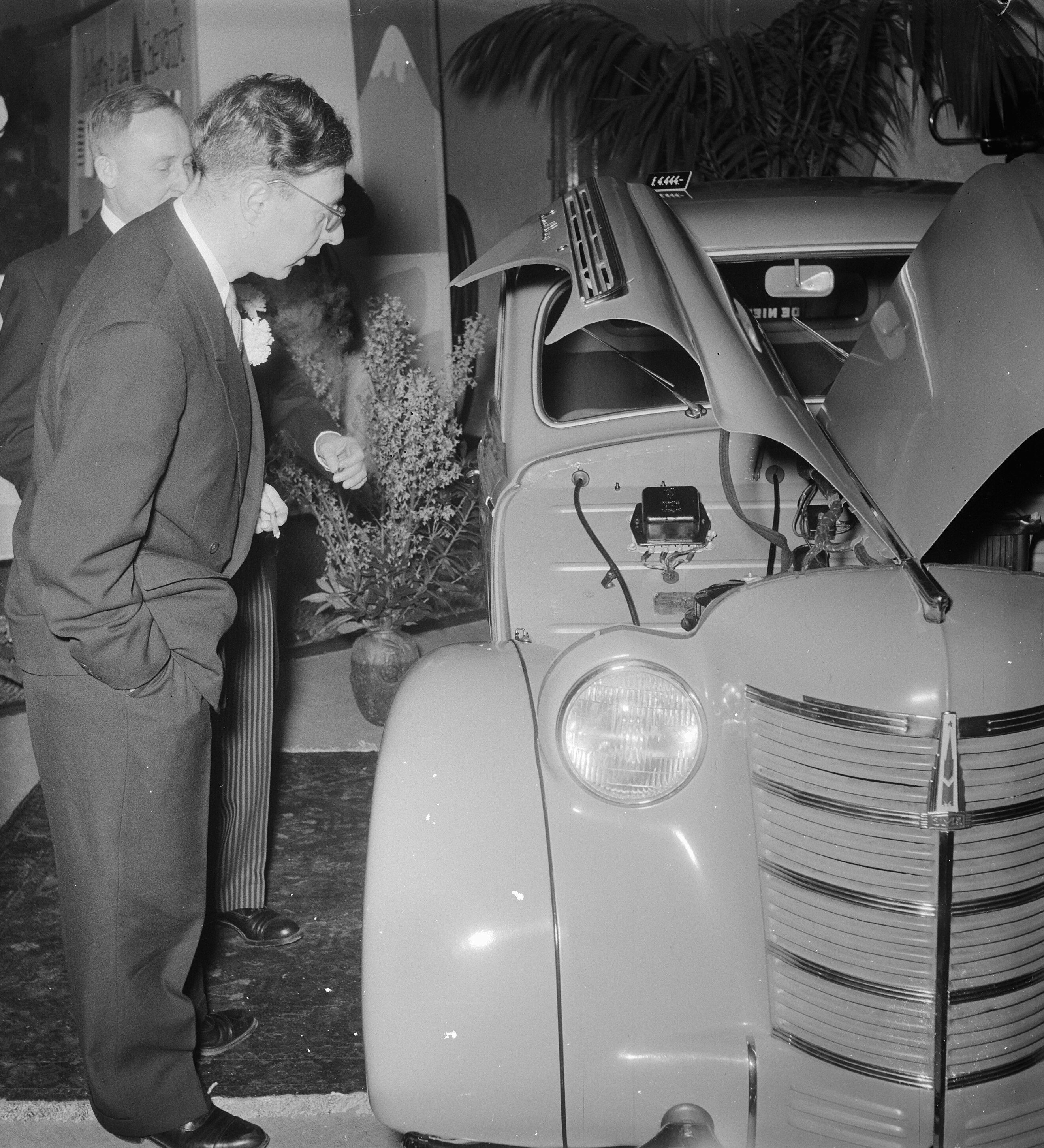 Collectie / Archief : Fotocollectie Anefo Reportage / Serie : [ onbekend ] Beschrijving : Opening van de RAI-autotentoonstelling door de minister van Economische Zaken, prof. dr. J. Zijlstra. De minister toonde veel belangstelling voor de Russische Moskvitch Datum : 26 februari 1954 Locatie : Amsterdam, Noord-Holland Trefwoorden : auto's, ministers, openingen, tentoonstellingen Persoonsnaam : Moskvitch, Zijlstra, Jelle Fotograaf : Noske, J.D. / Anefo Auteursrechthebbende : Nationaal Archief Materiaalsoort : Negatief (zwart/wit) Nummer archiefinventaris : bekijk toegang 2.24.01.03 Bestanddeelnummer : 906-3155